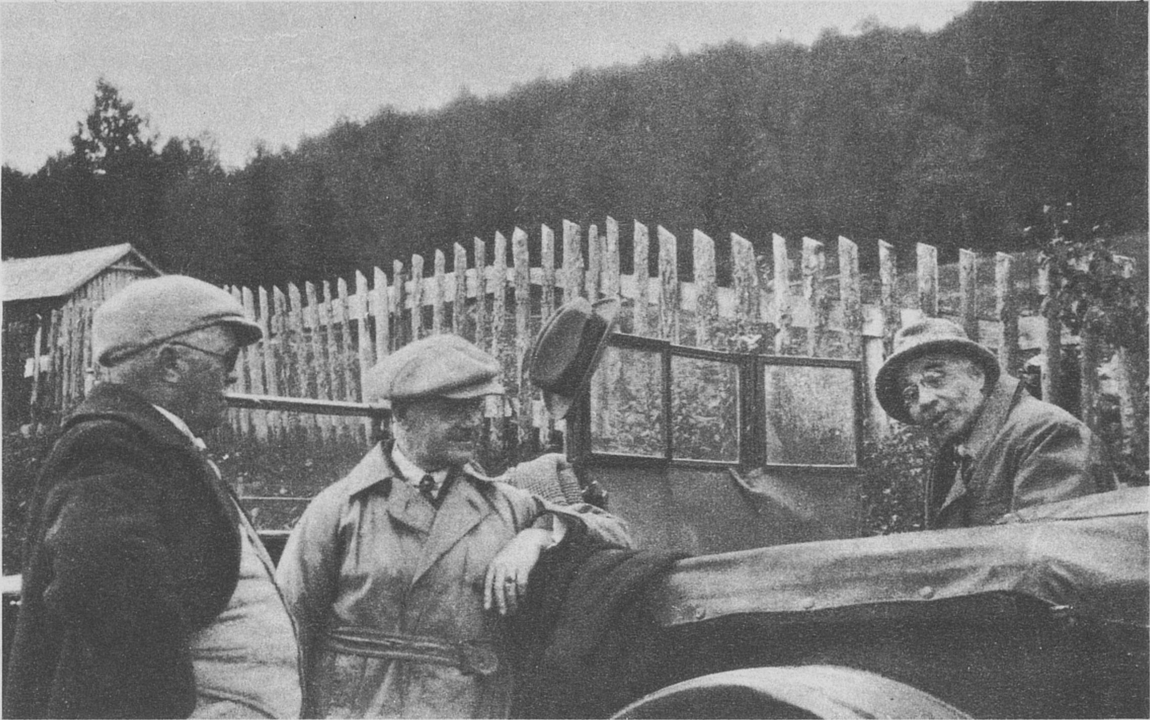 Fra venstre Gerhard Munthe, Carl W. Schnitler og Hans E. Kinck i Hallingdal.